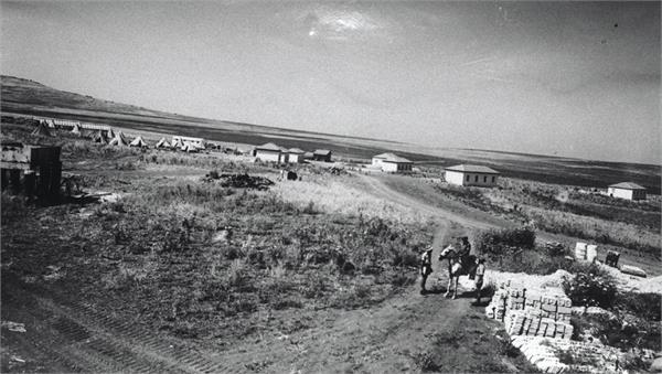 גזר - מראה כללי